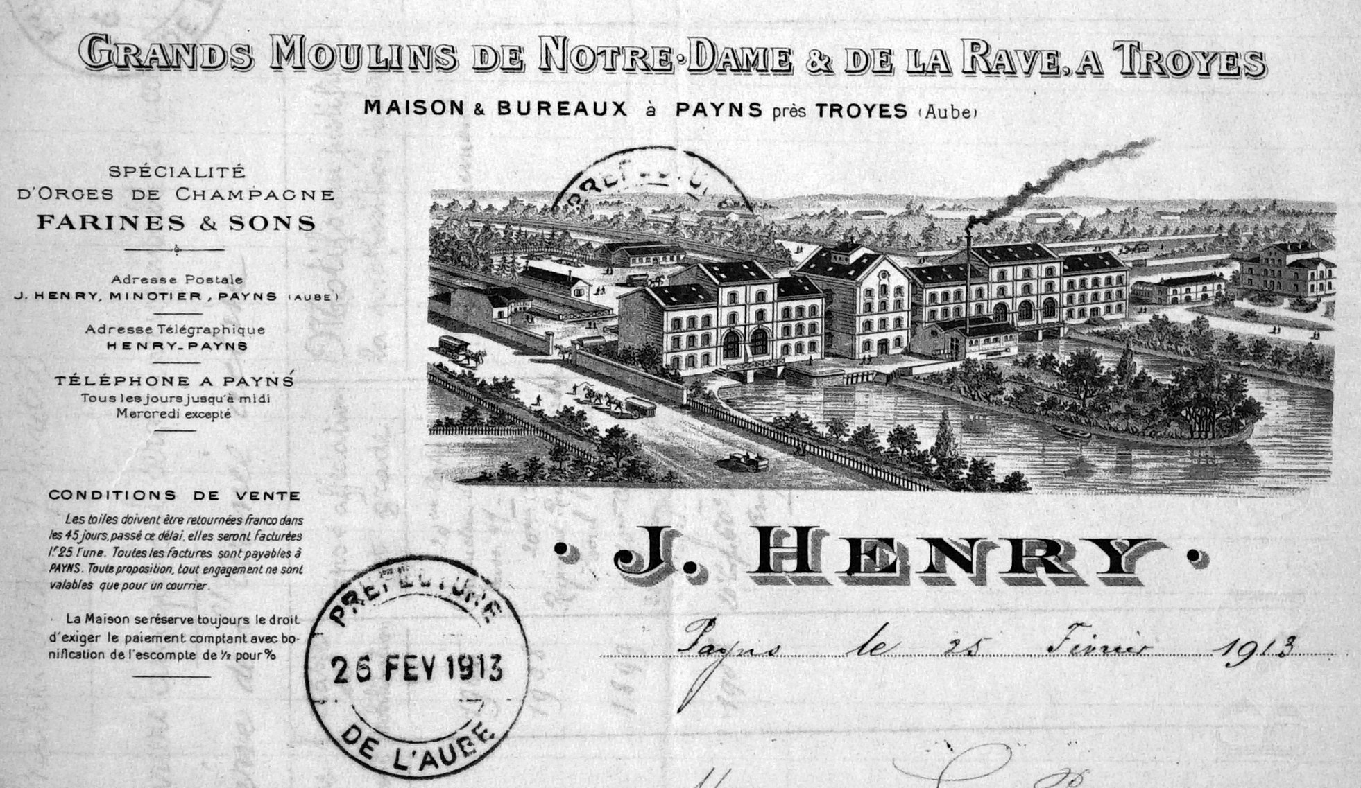 sur une vue du début du XXe siècle.